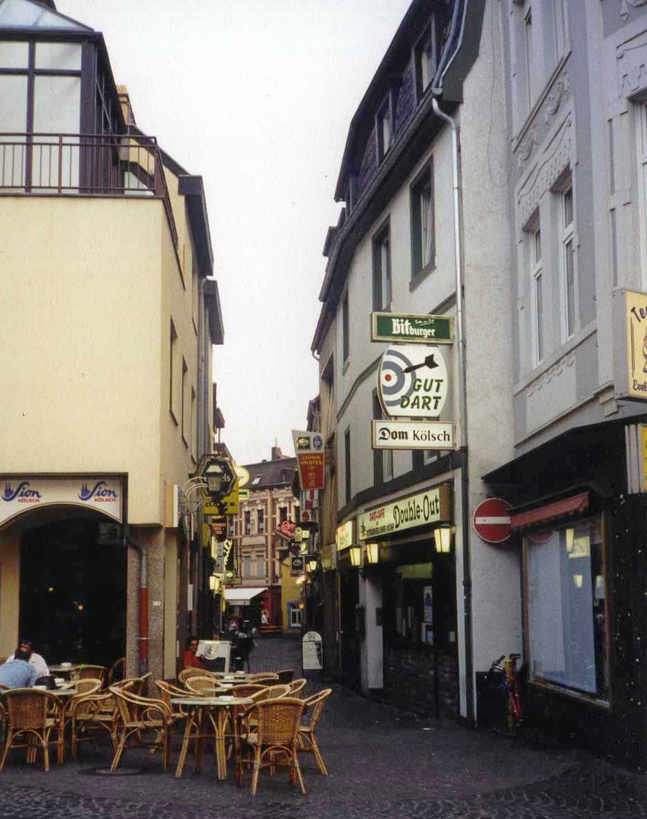 Kneipenmeile "Schnellengasse" in der Eschweiler Altstadt in Eschweiler in der Städteregion Aachen